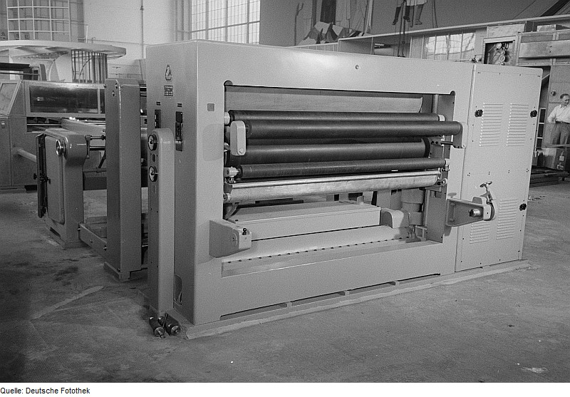 Original image description from the Deutsche Fotothek Textilindustriemaschinen des VEB Kombinat Textima Karl-Marx-Stadt auf der Leipziger Herbstmesse 1954